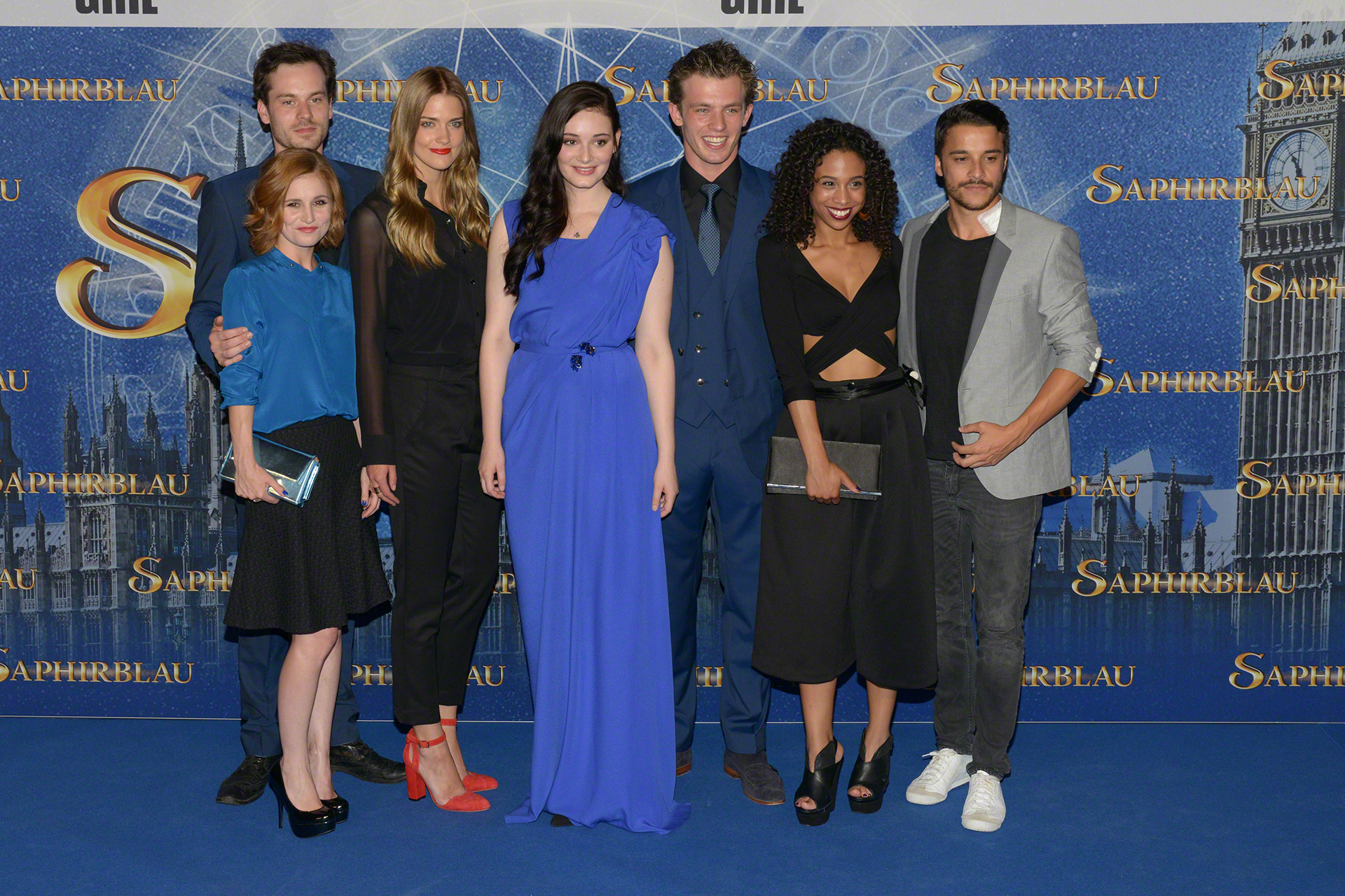 Darsteller des Filmes "Saphirblau" auf der Deutschlandpremiere im Cinedom Köln am 11. August 2014.